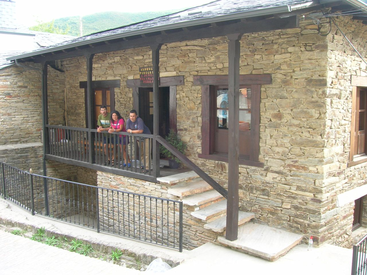 Albergue de peregrinos de Pereje, en la Sierra de Los Ancares, que todavía conserva el trazado medieval del Camino en su Calle Mayor. Vuela hasta esta localización Necesitas el programa Google Earth